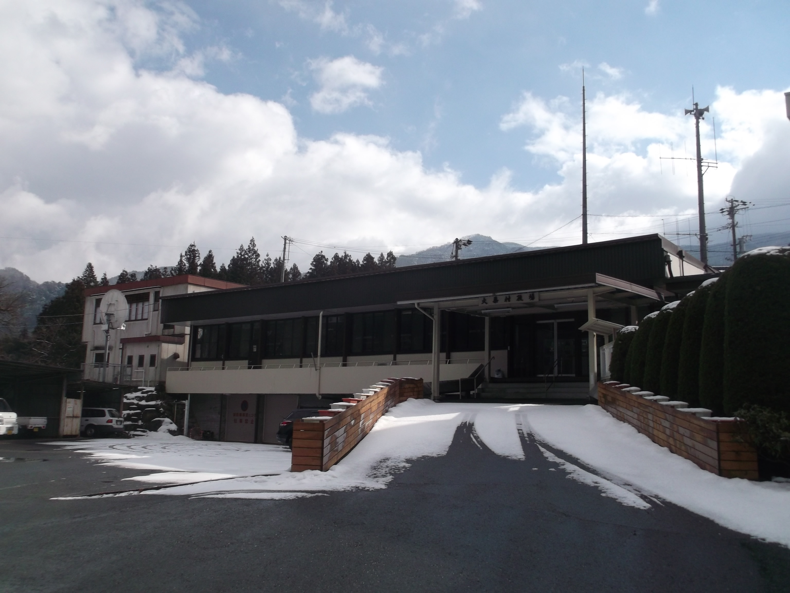 長野県木曽郡大桑村役場